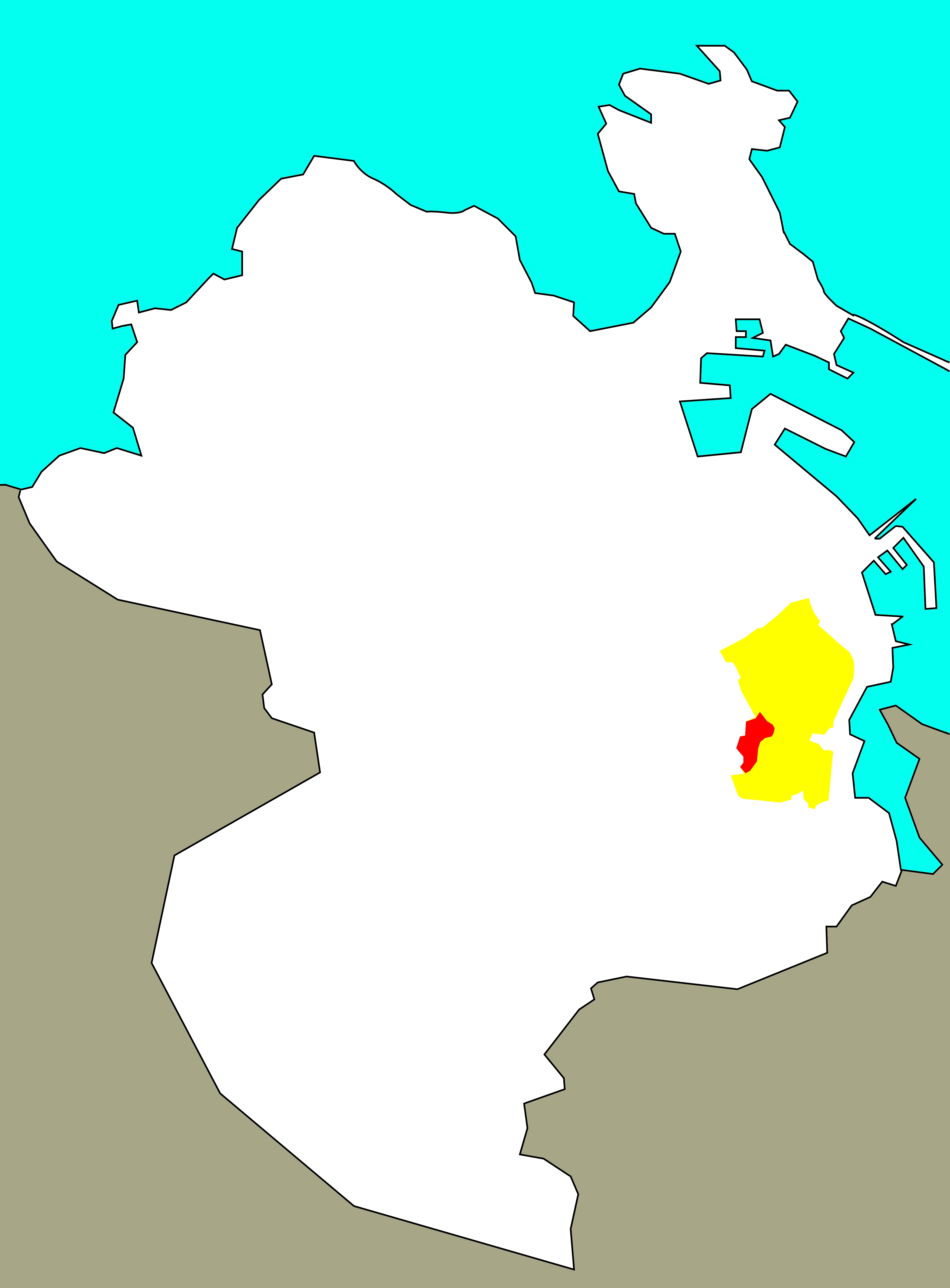 Situación de Eirís de Abaixo no "barrio-territorio" de Eirís, segundo